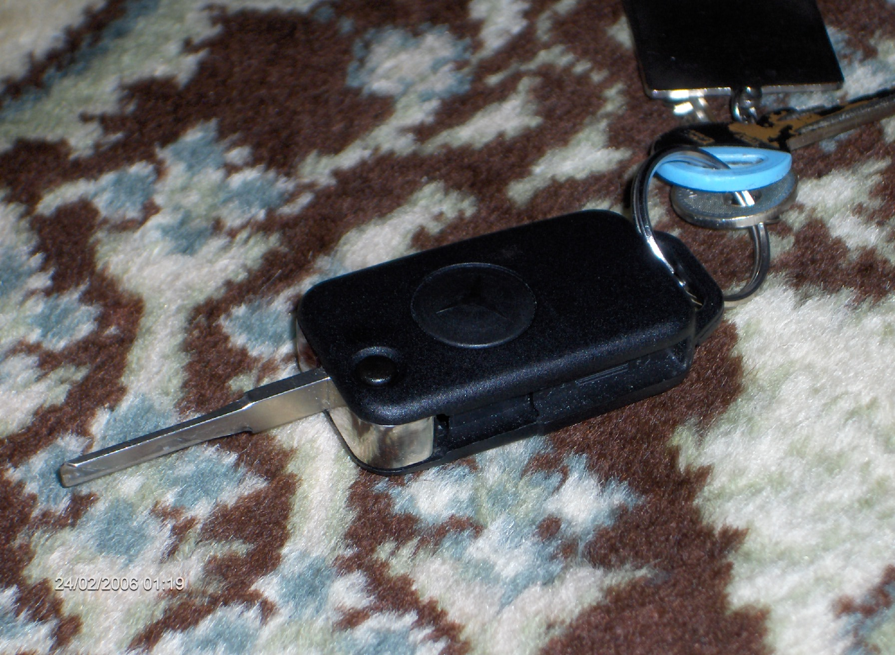 een foto van een klapsleutel, zelf gemaakt.